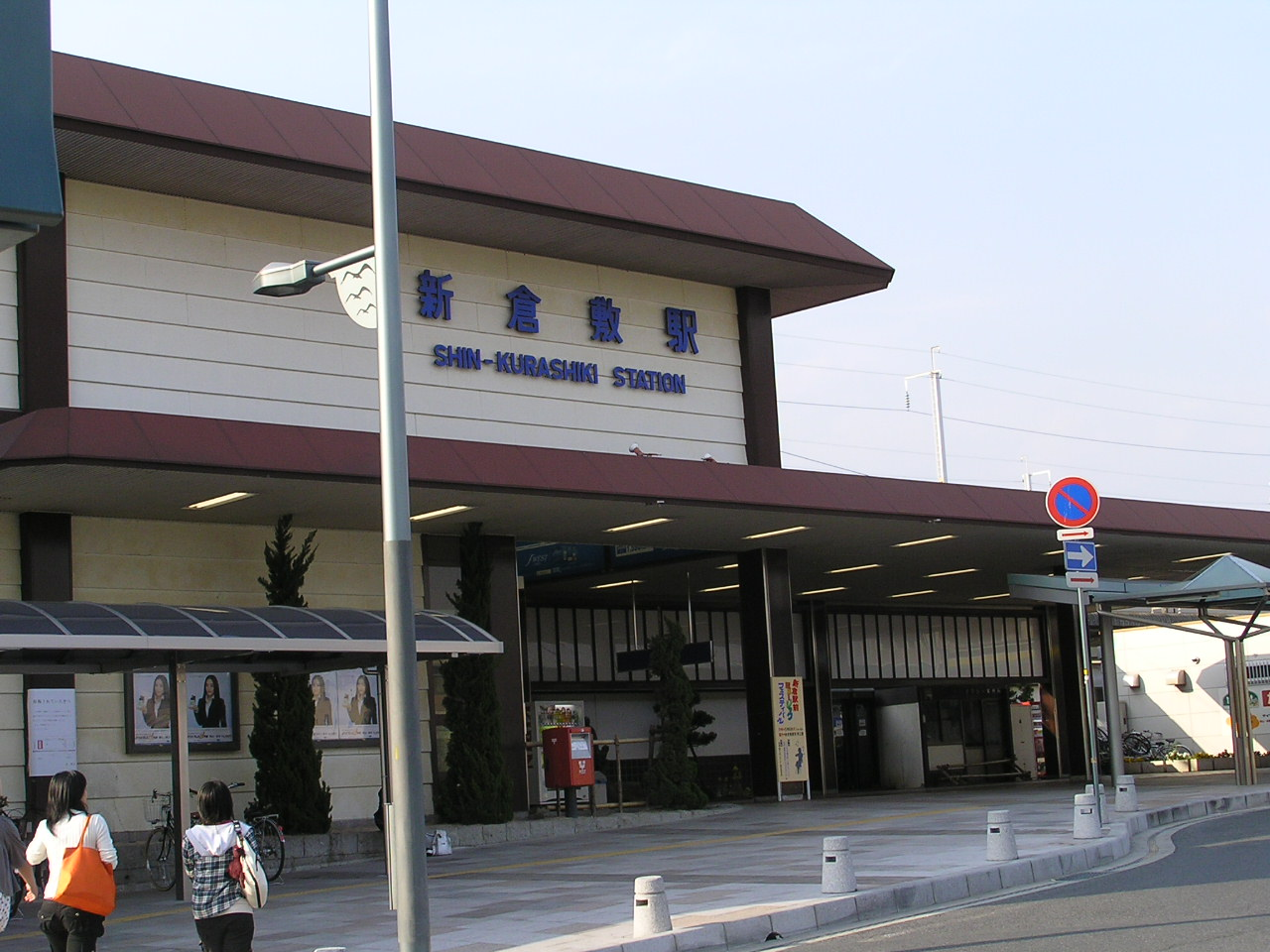 sinkurasiki station